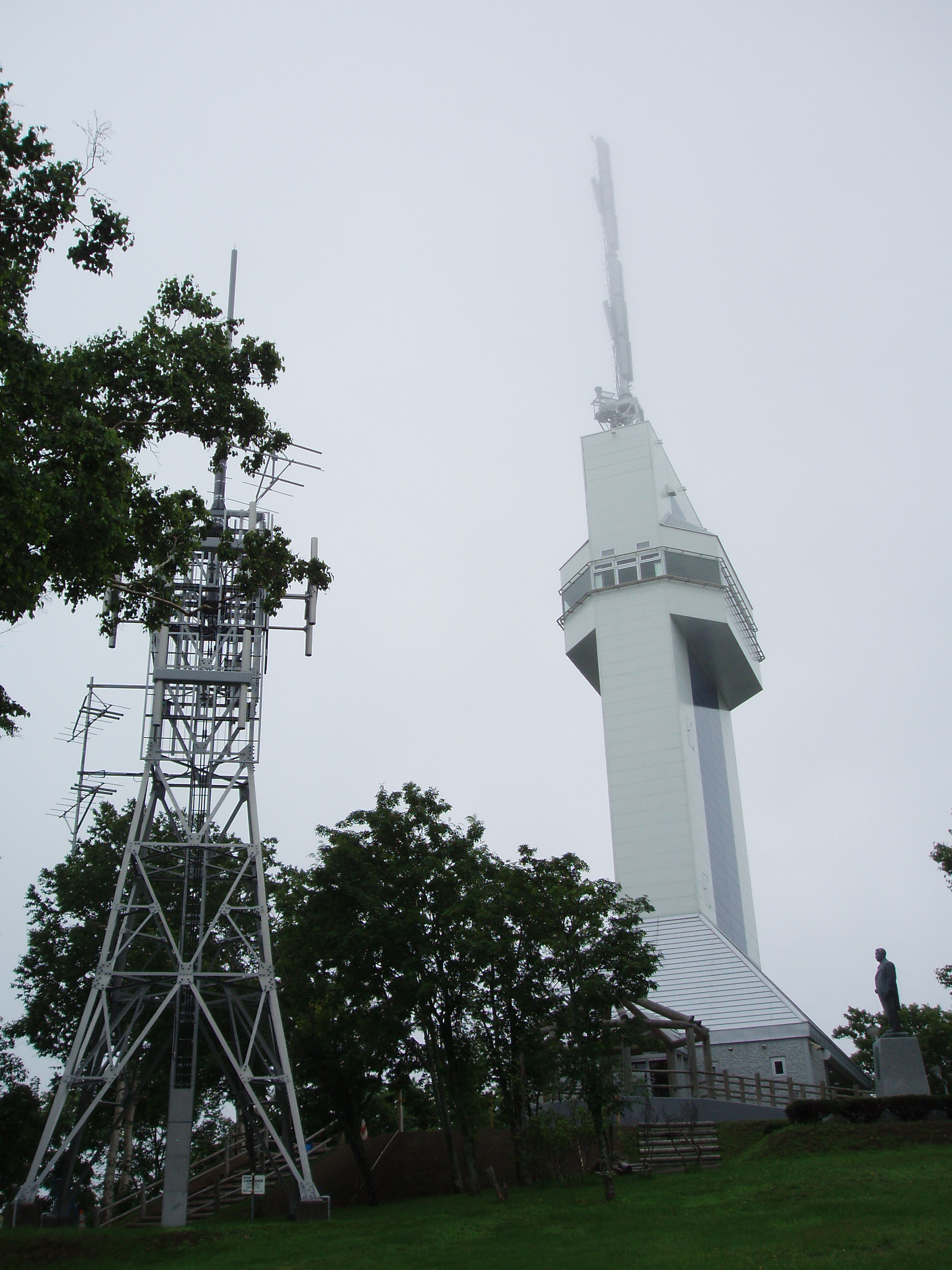 紋別中継局 NHK FM送信設備